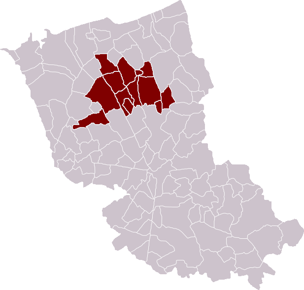 Locatie Kanton Sint-Winoksbergen in het arrondissement Duinkerke, Frankrijk - zelfgemaakt Location Canton of Bergues in the Dunkirk district, France - self made Localisation Canton de Bergues dans l'arrondissement de Dunkerque, France - fait moi-même